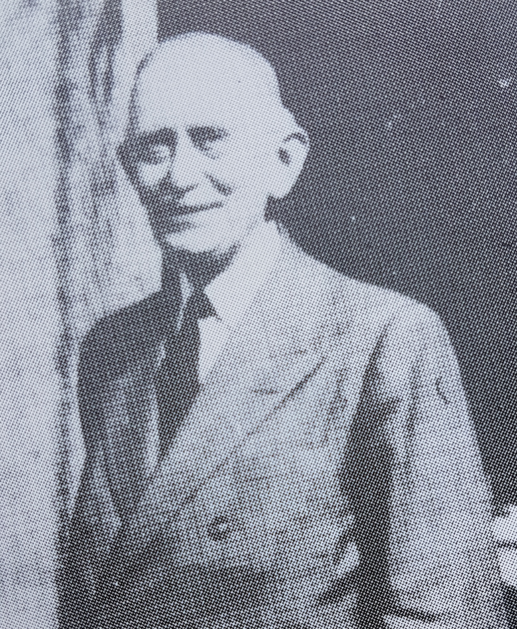 George Unné svenskfödd fransk ingenjör och flygpionjär